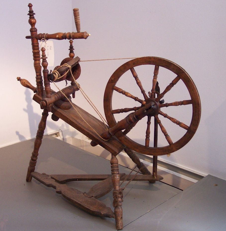 Spinnrad